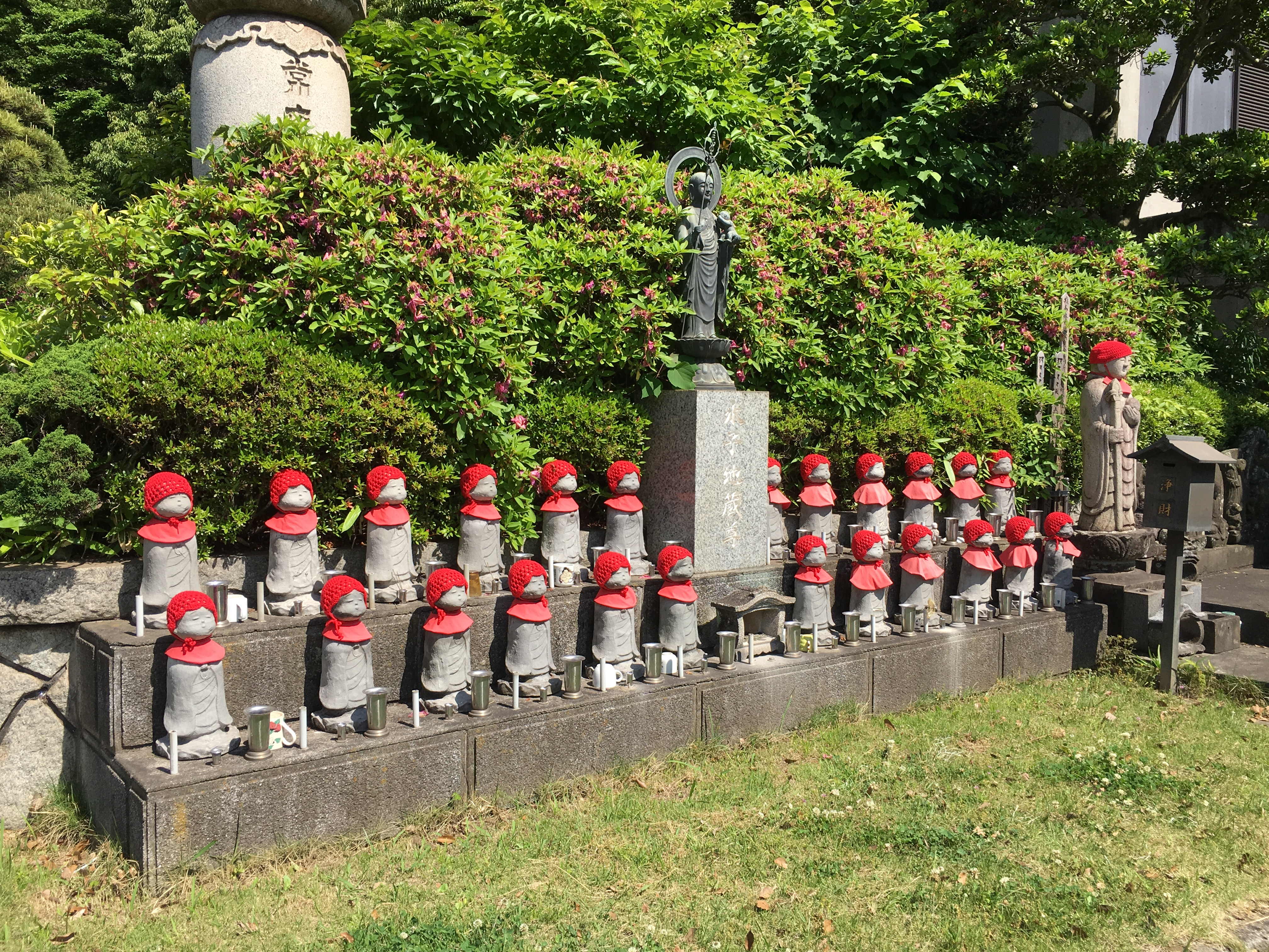 千葉市胤重寺の水子地蔵。